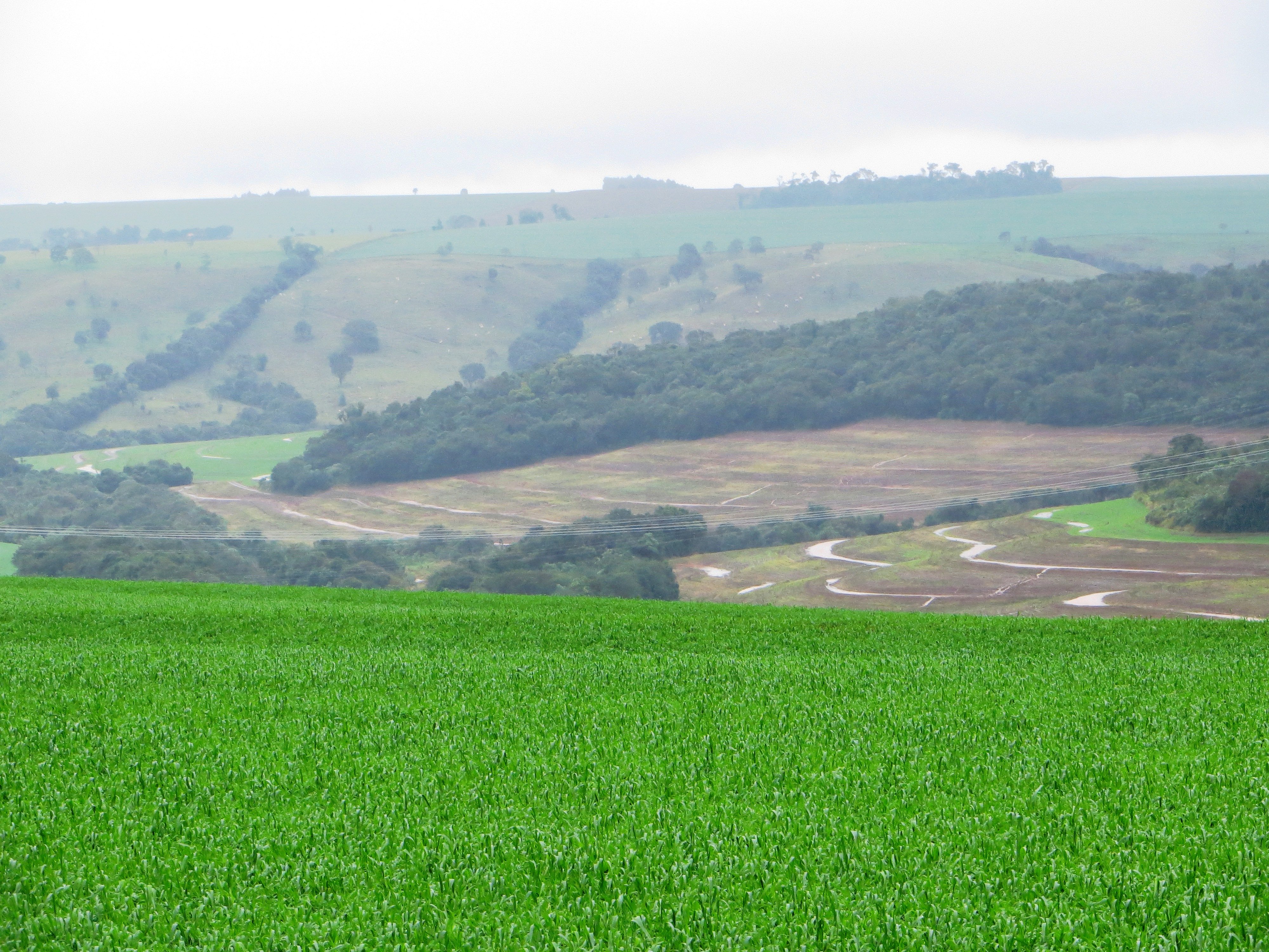 Plantação de trigo em Céu Azul (PR), Brasil